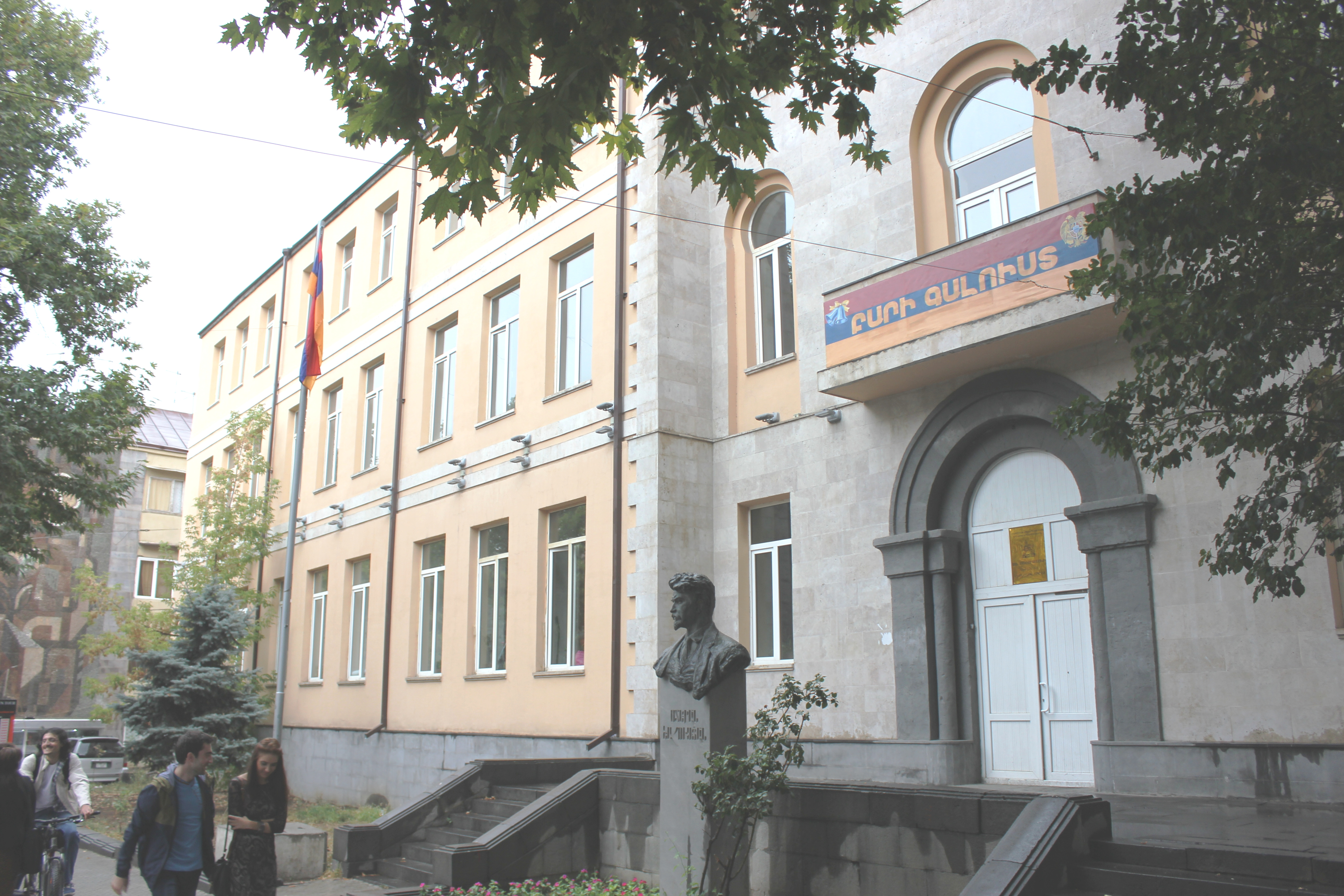 Ստեփան Շահումյանի անվան դպրոցi շենք 1928 թ. 1932 թ., Մեսրոպ Մաշտոցի պող. 33, Ճարտ.` Ն. Բունիաթյան 6/70